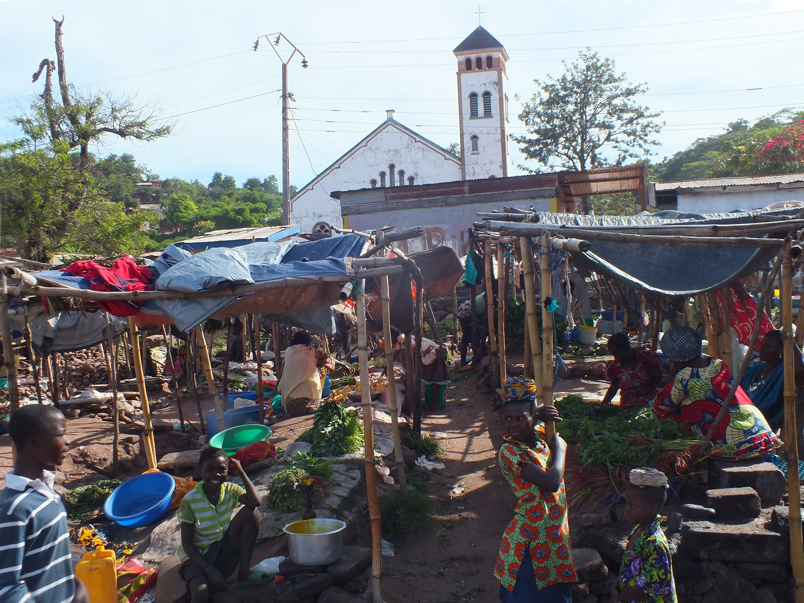 Le marché en face à l'église Maïndéleo qui signalise le centre-ville de Kalémie.